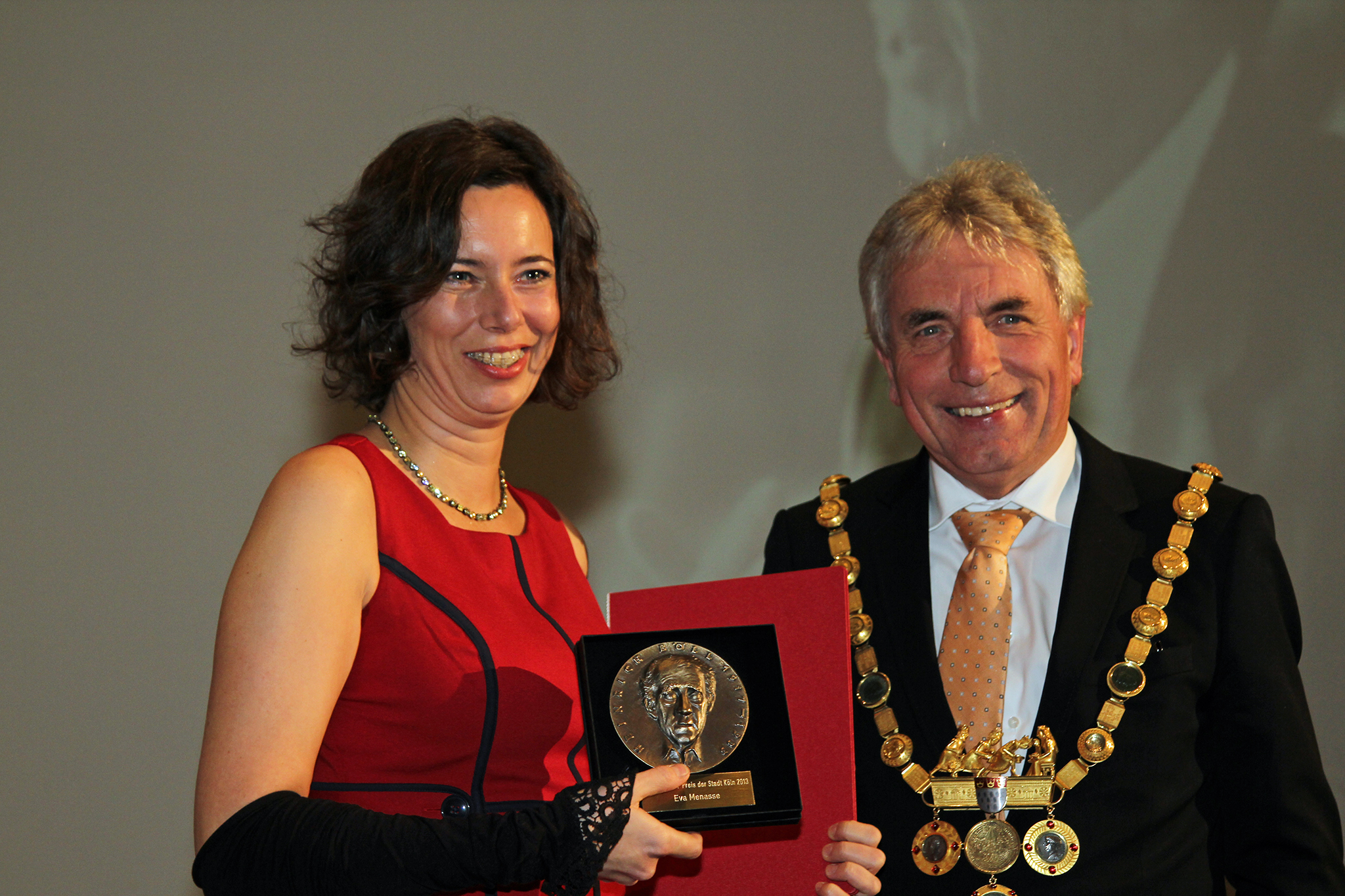 Eva Menasse bei der Verleihung des Heinrich-Böll-Preises 2013 in Köln, mit Oberbürgermeister Jürgen Roters